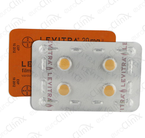 Vardenafil her i form av medikamentet Levitra, som brukes for å behandle impotens.